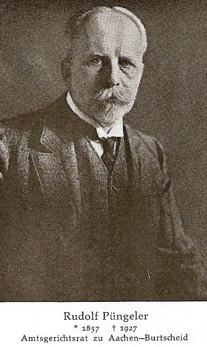 Portraitaufnahme